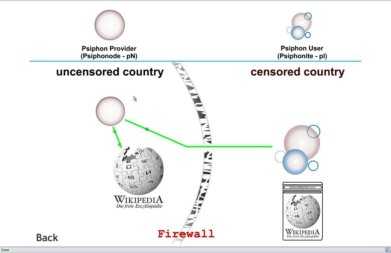 псифон